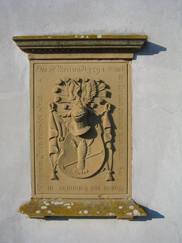 Gedenktafel an der St.-Anna-Kapelle in Allfeld, für Melchior Krebs († 1594)